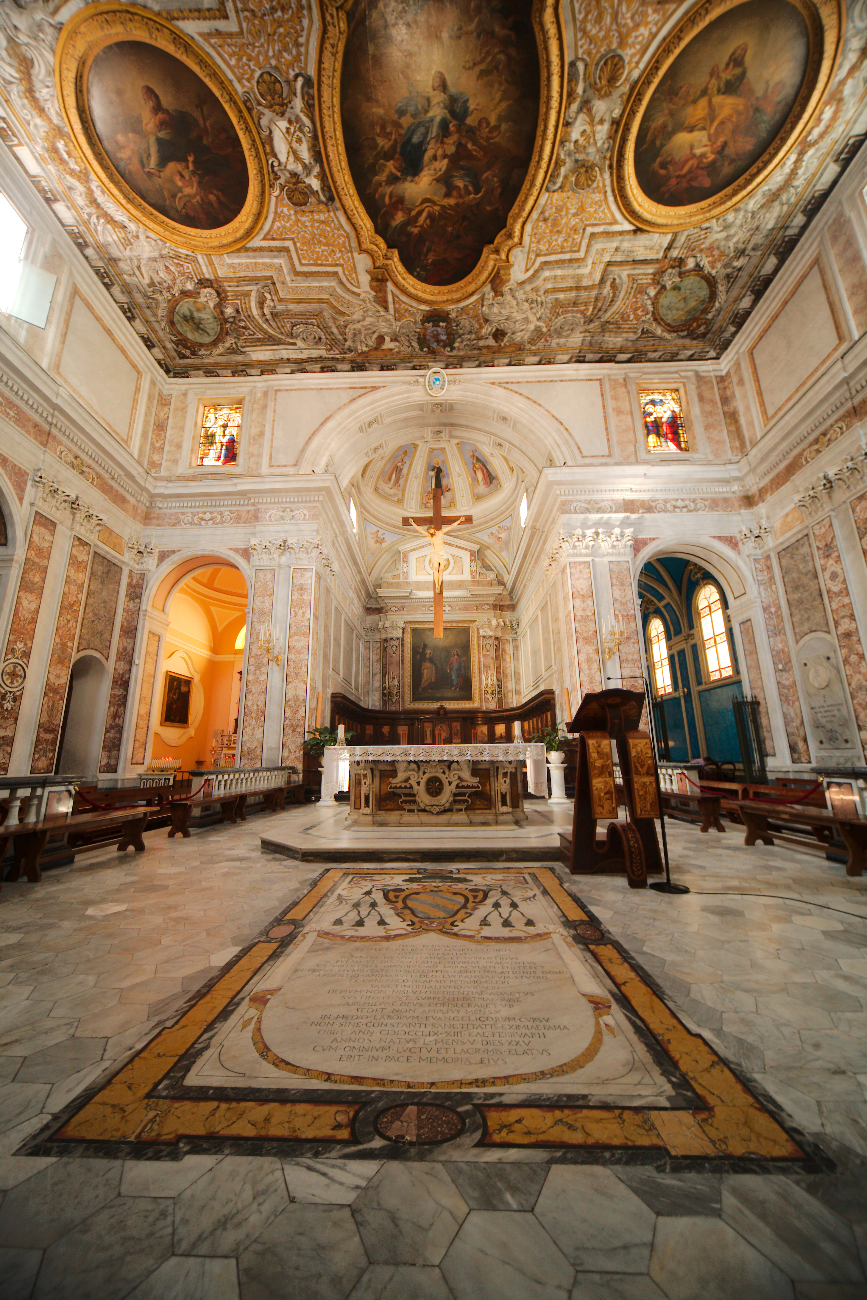 Duomo di Sorrento